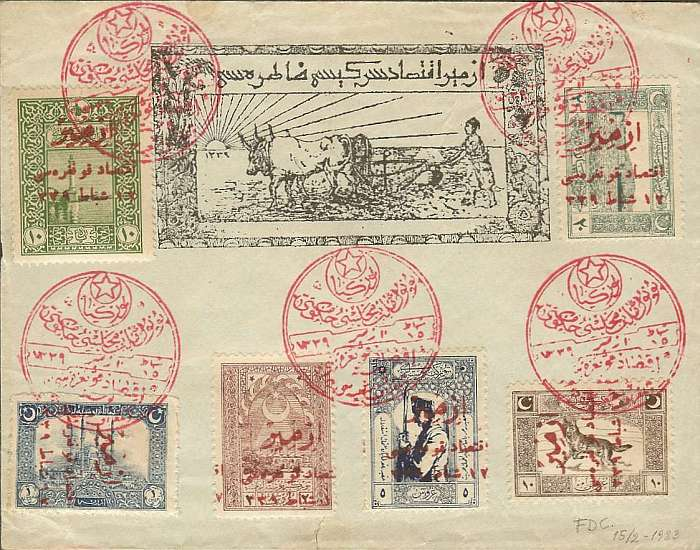 Lisans